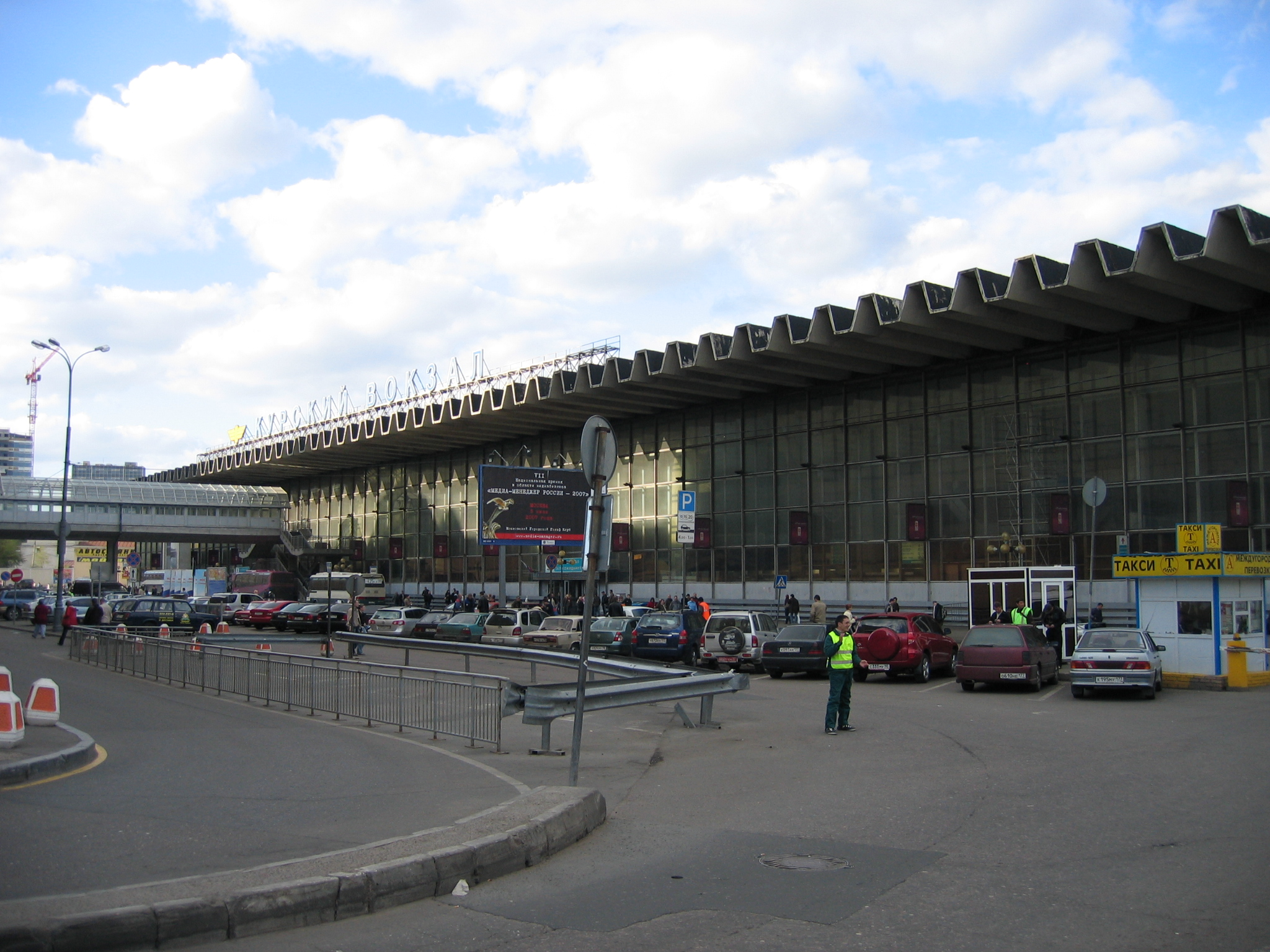 Новое здание Курского вокзала до реконструкции